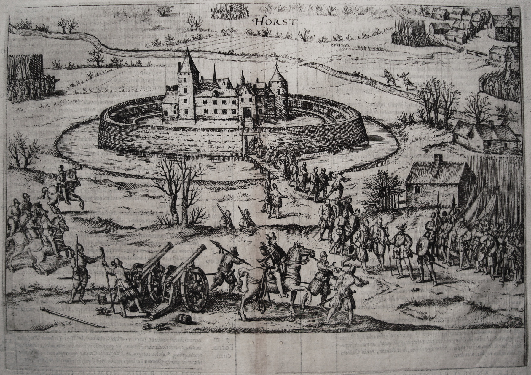 Belagerung von Schloss Horst in Horst (Essen), Deutschland